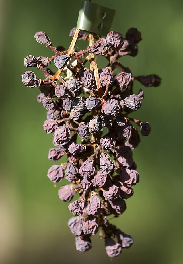 Schwarzfäule der Rebe